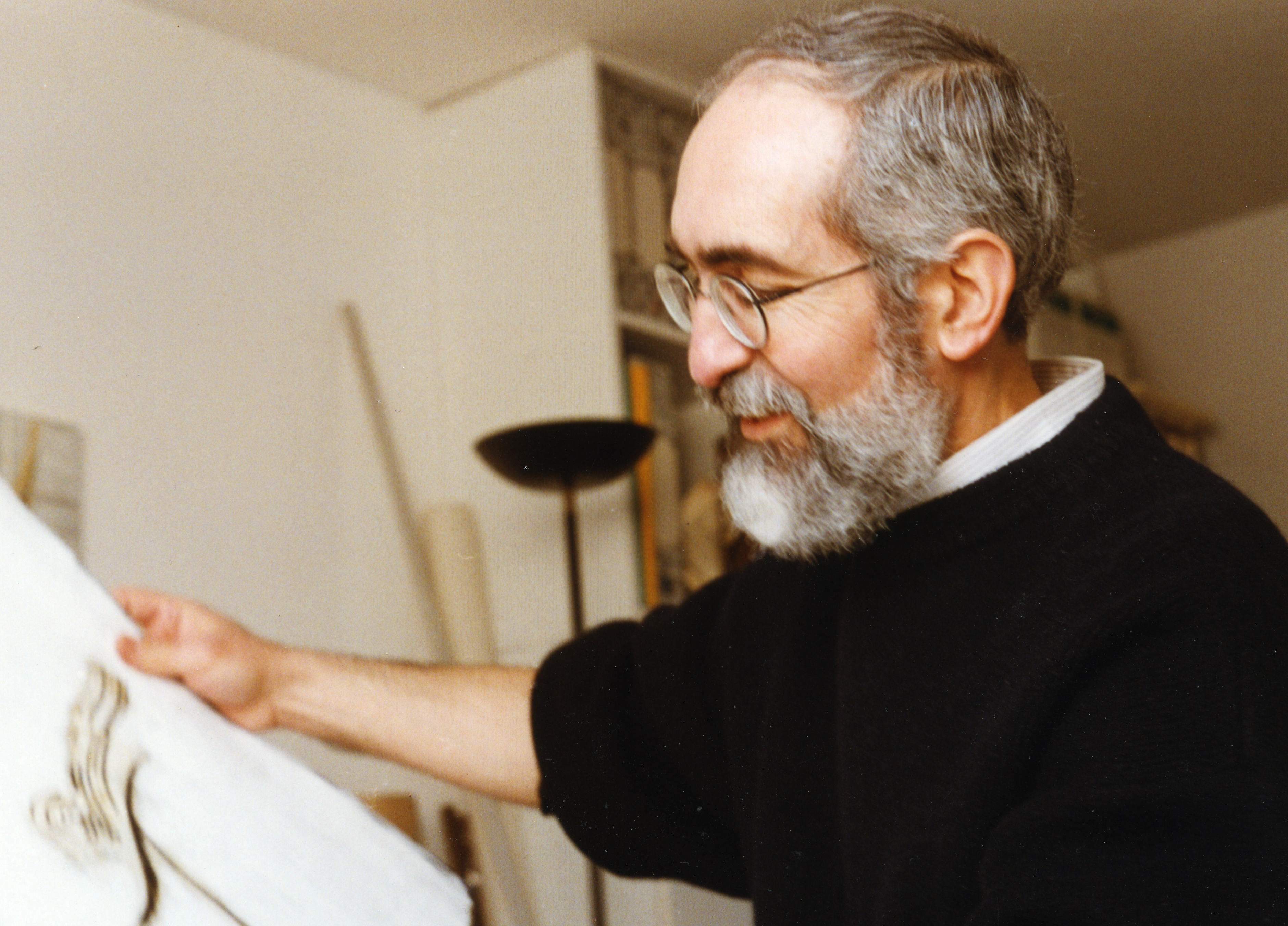 حميد تيبوشي، شاعر و فنان جزائري سنة 1997